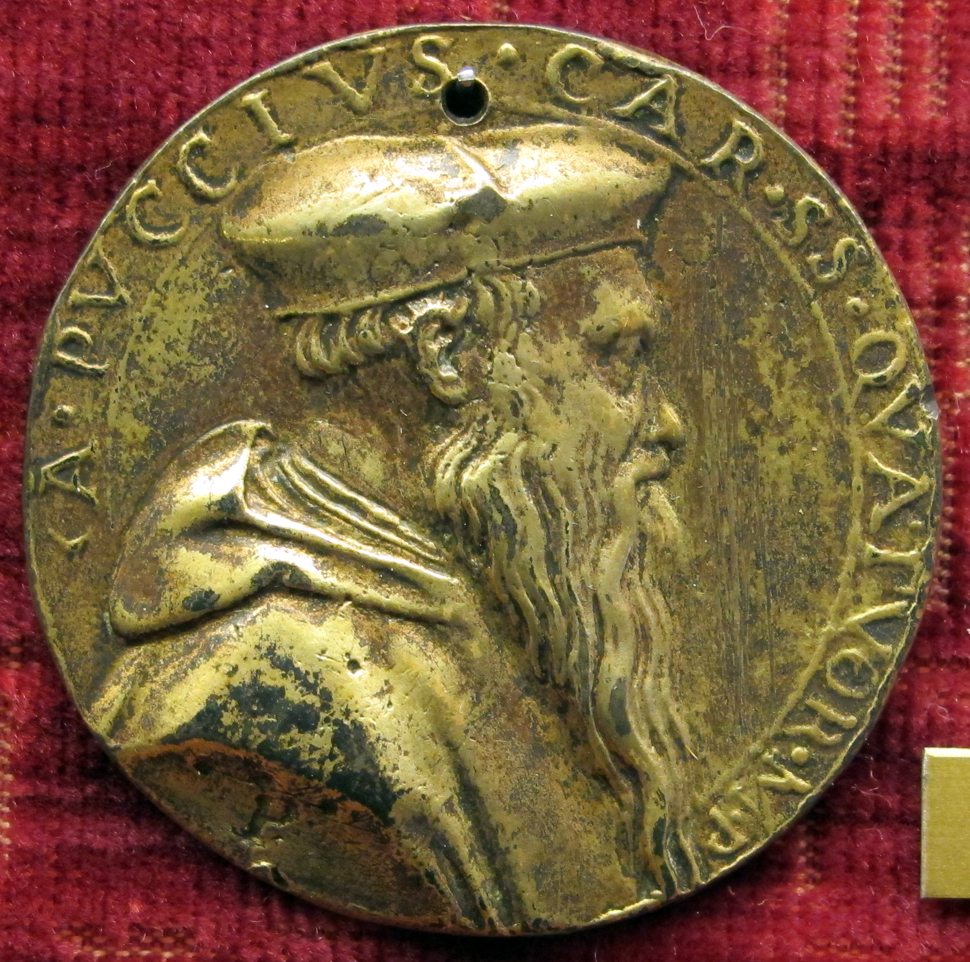 Medaglia di antonio pucci, vescovo di pistoia (no verso)